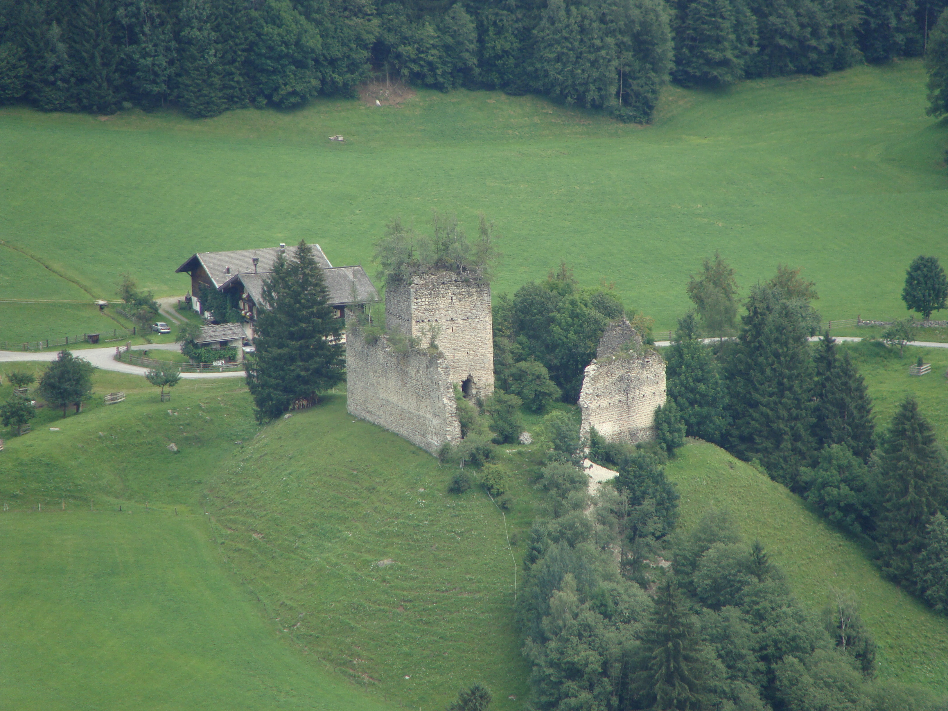 Burgruine Hieburg nahe Neukirchen am Großvenediger